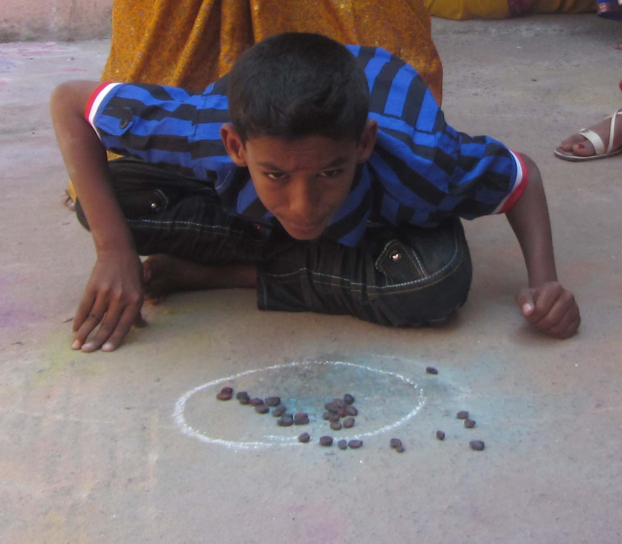 own shot - ஊதுமுத்து விளையாட்டு